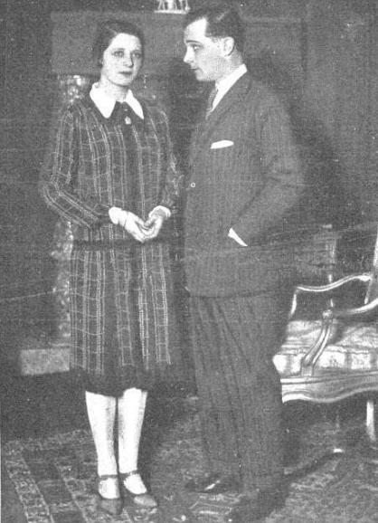 Los actores españoles Carlos Díaz de Mendoza y Rosario Larrabeiti